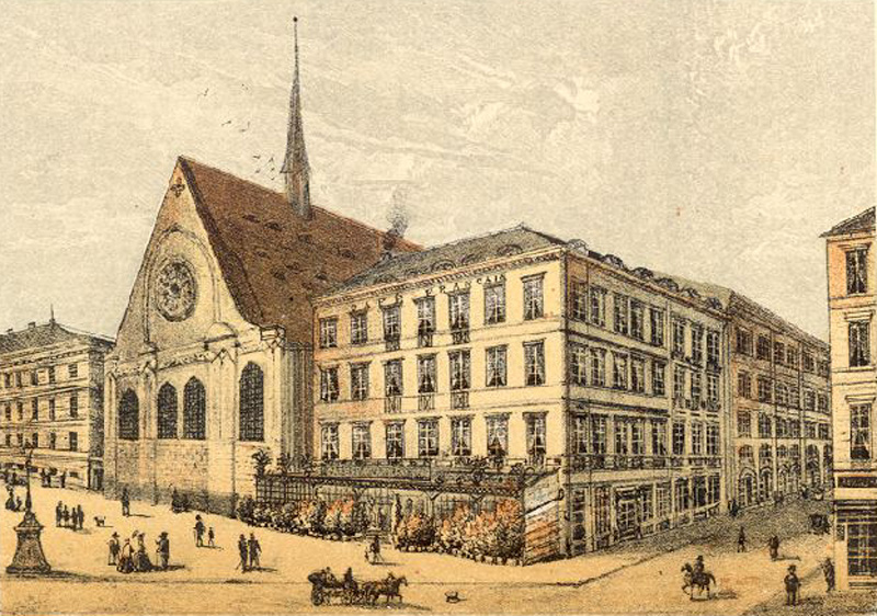 Café français in Leipzig um 1850 (Lithographie)